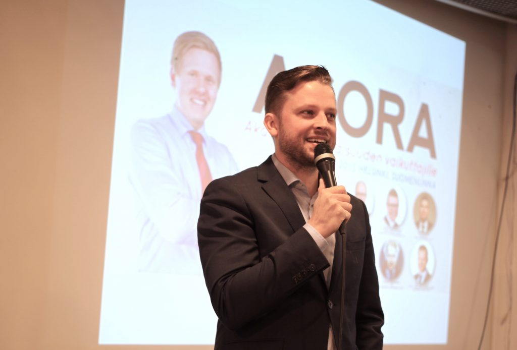 Aki Ruotsala kuvattuna KD Nuorten Agora-akatemiassa Suomenlinnassa vuonna 2015